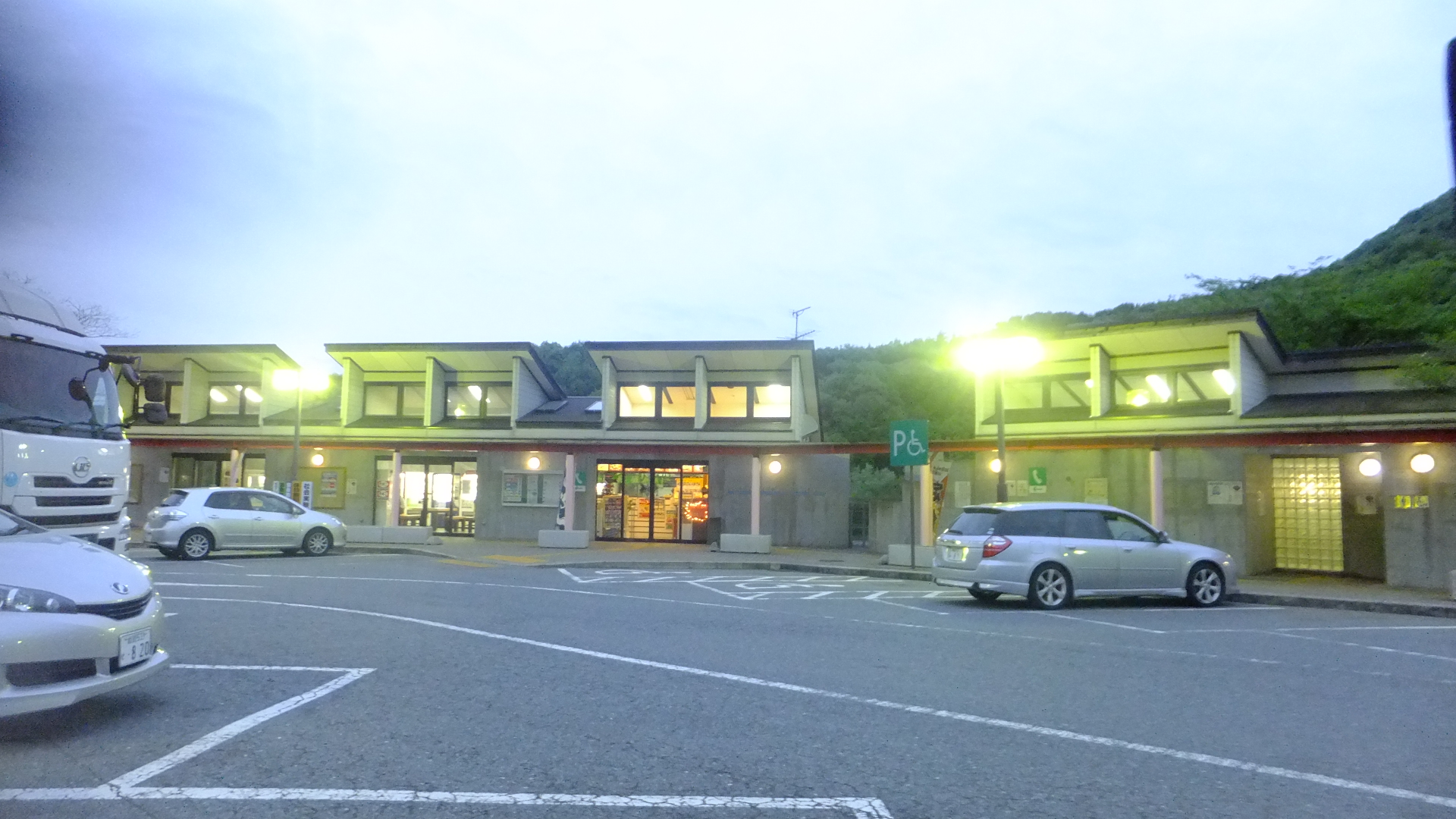 豊富パーキングエリア